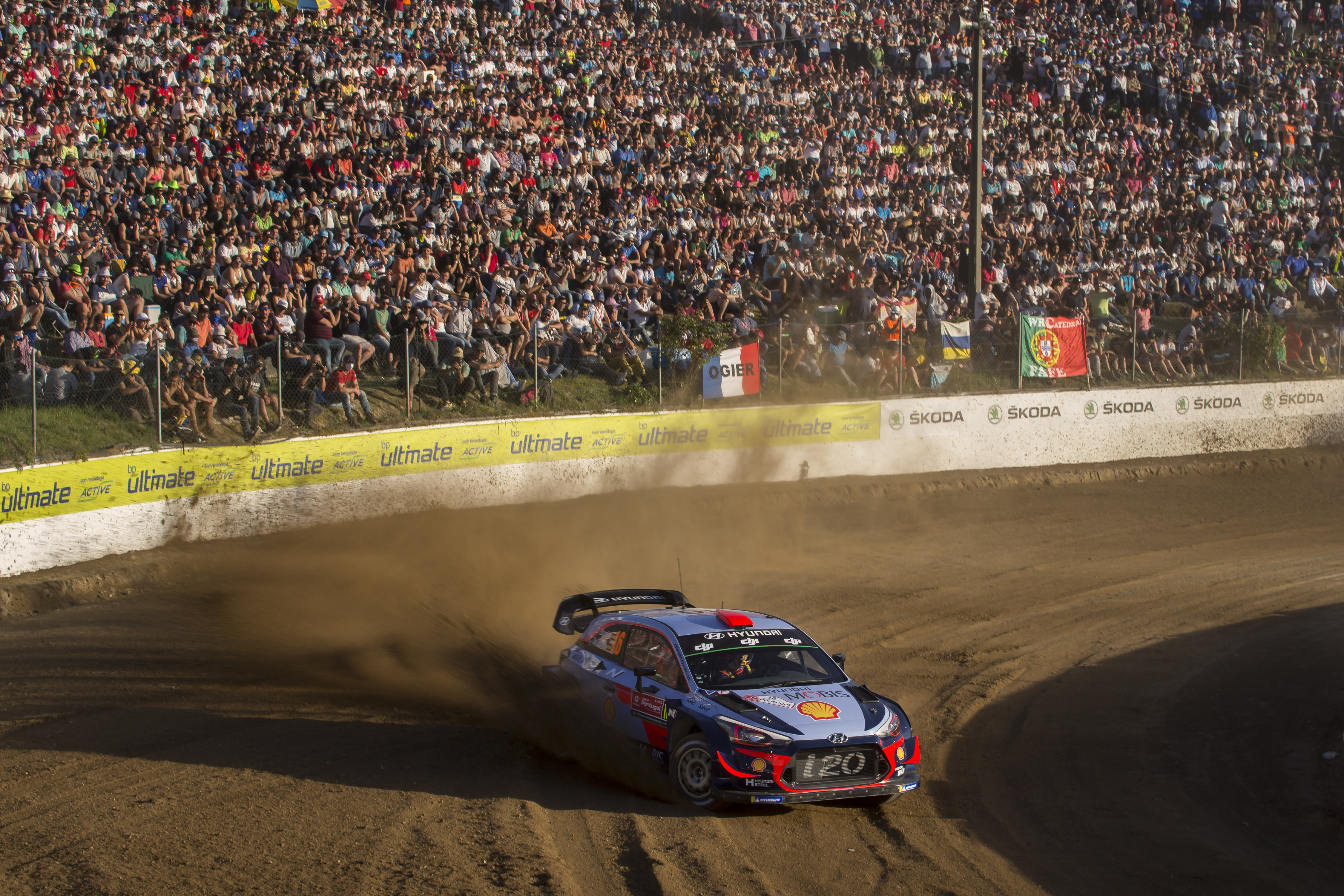 Dani Sordo podczas Rajdu Portugalii 2018